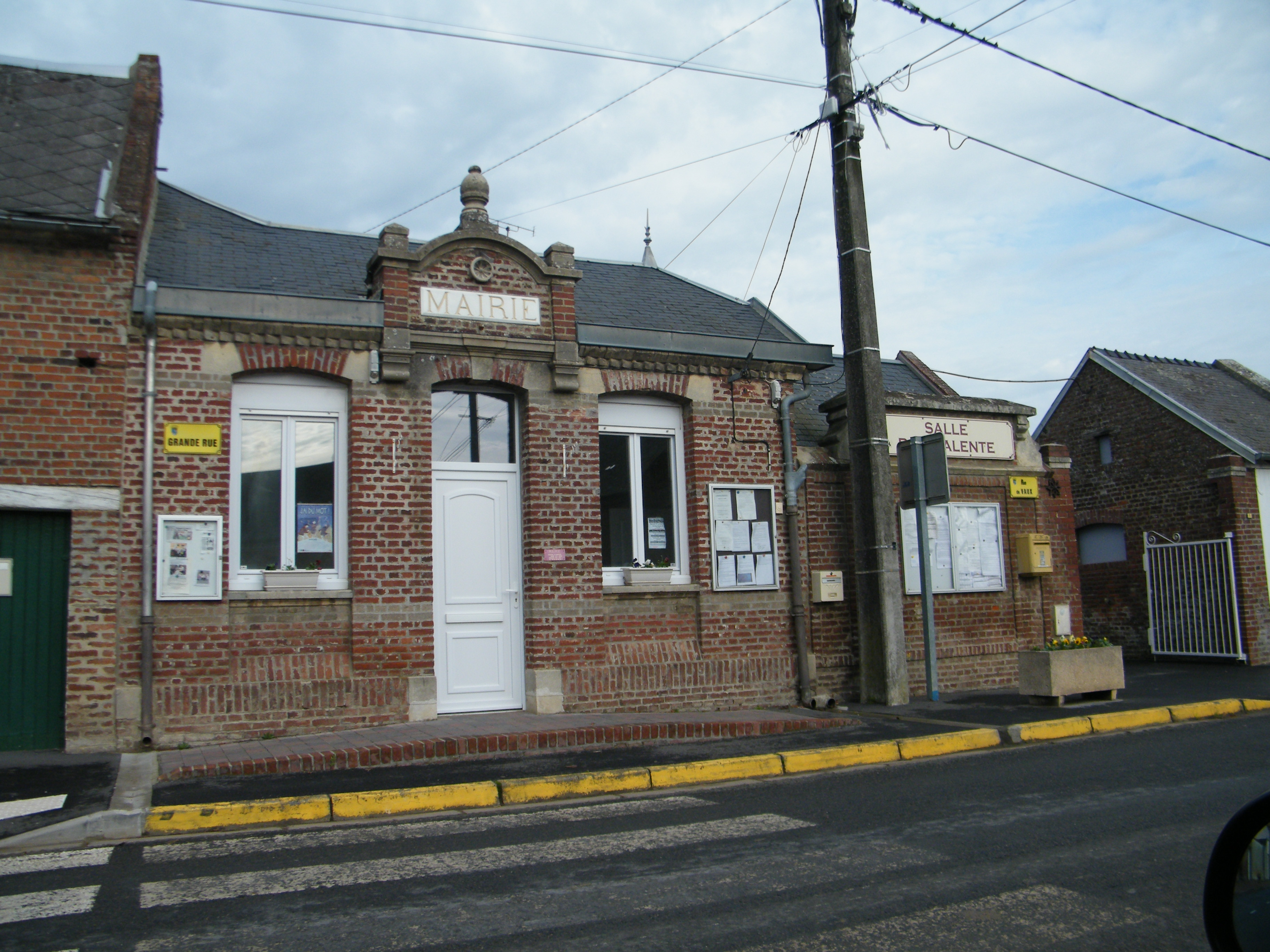 Mairie et accès à la salle polyvalente.